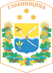 Герб Глобинського району